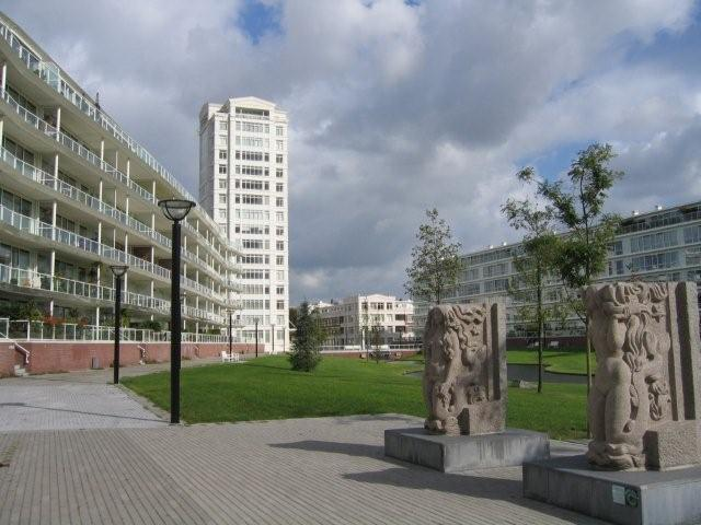 Burgemeester De Monchyplein, Den Haag